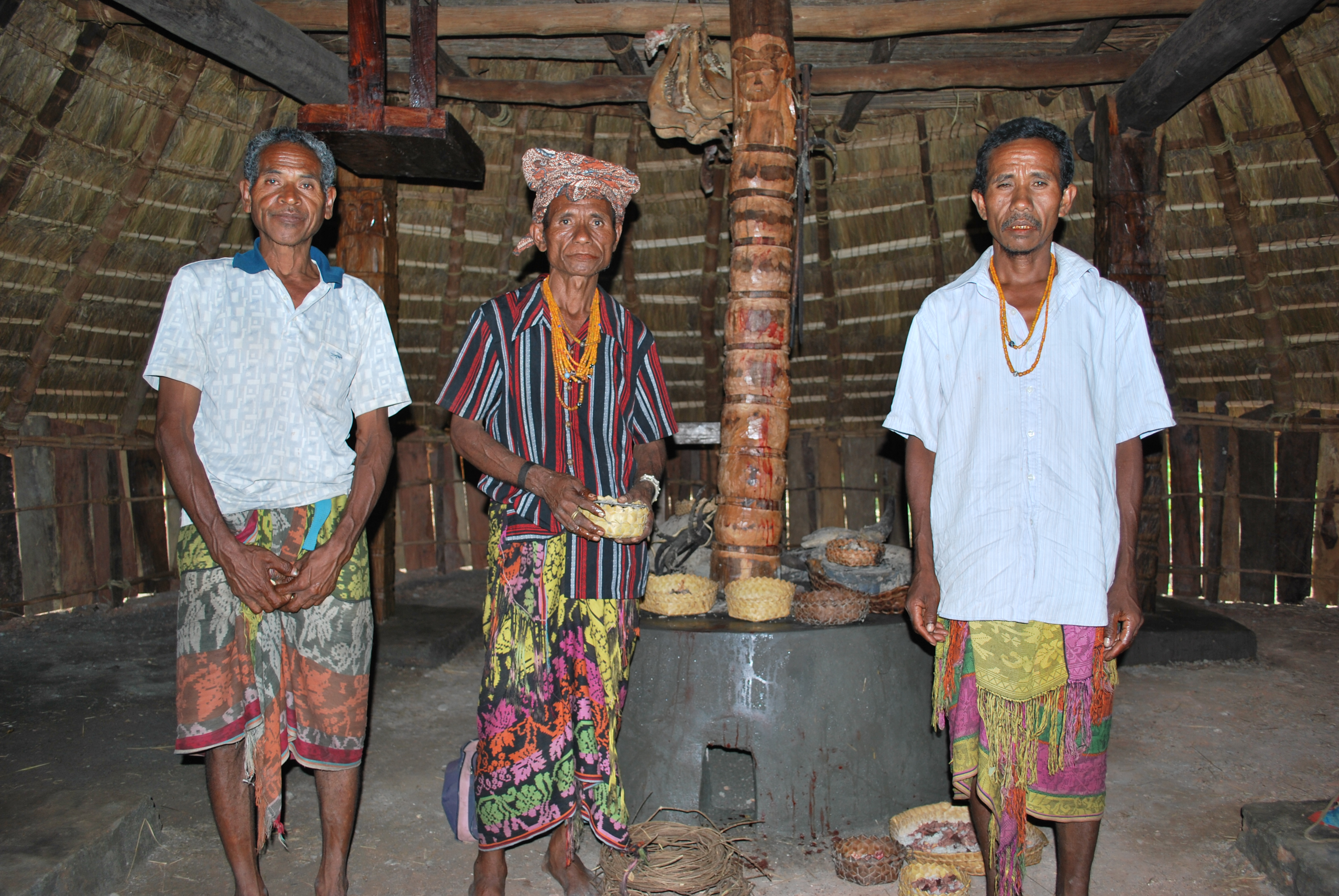 Tumin, Oessilo, Oecusse